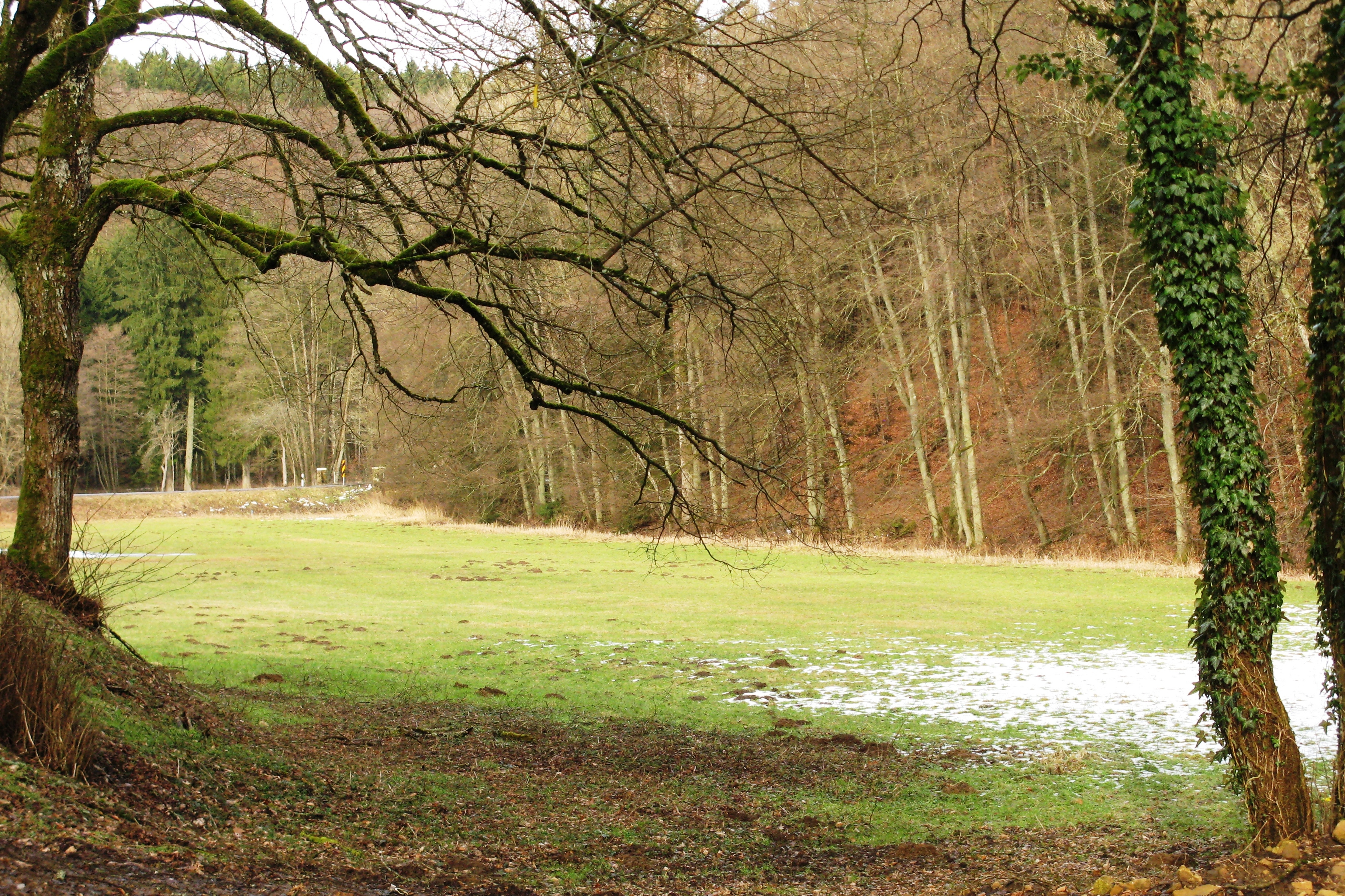 Den Dall vun der Giewelerbaach, vun der Neimillen an Direktioun Äisch gesinn, am Fong lénks den CR105.